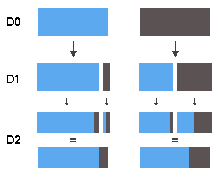 Illustration till exempel på Markovkedja.